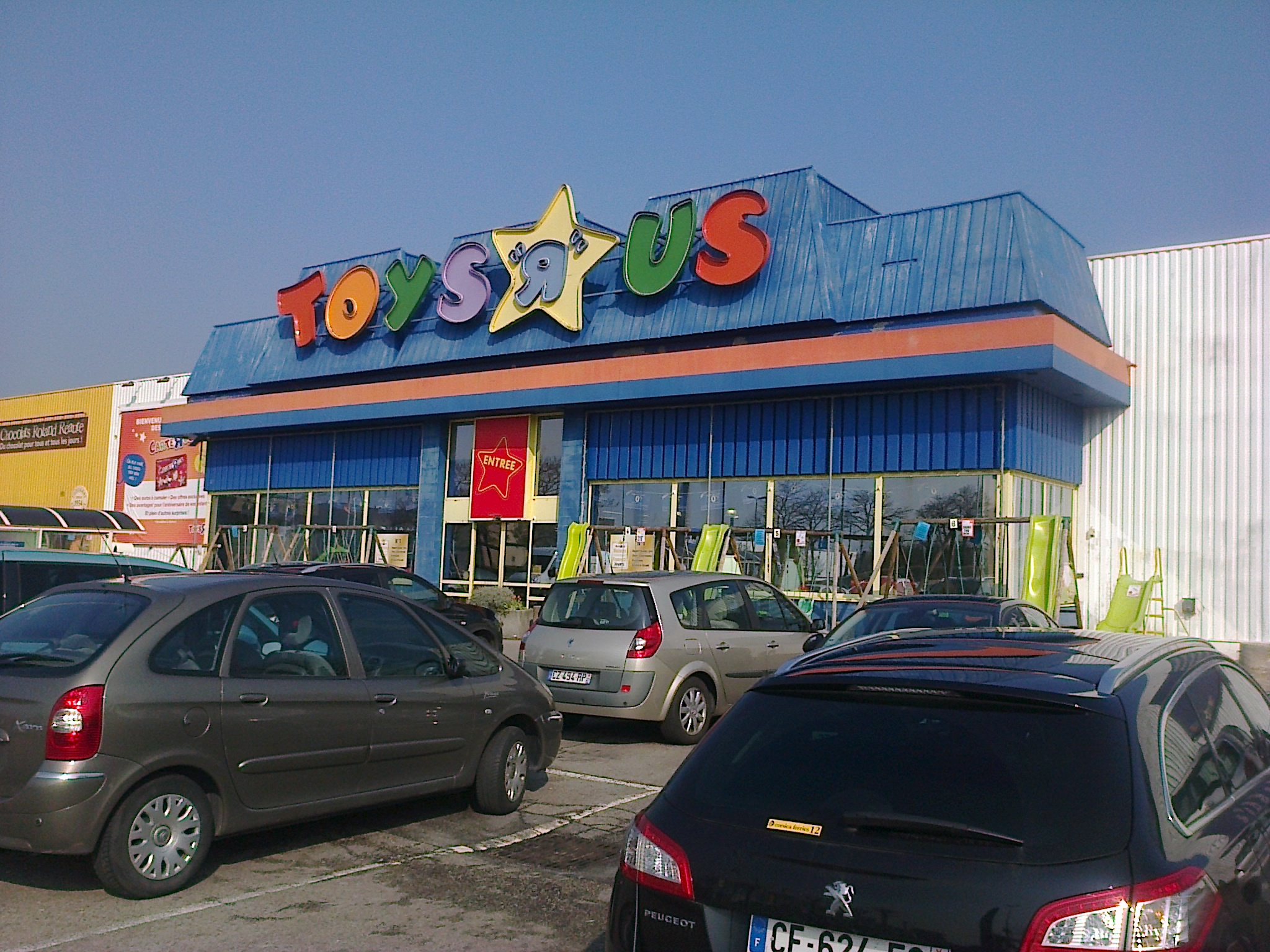 Boutique Toys "R" Us à Plaisir (Yvelines)